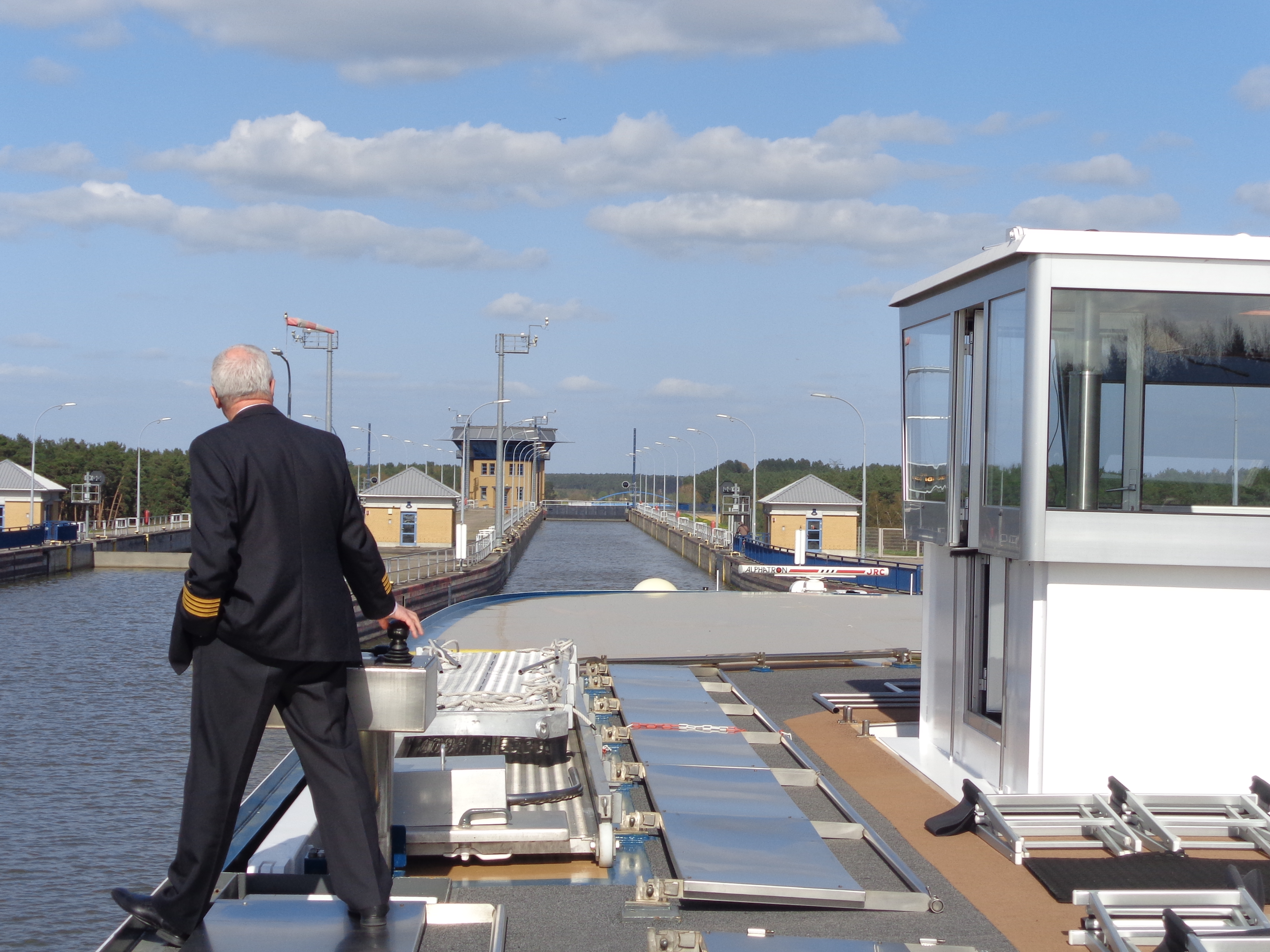 Westliche Einfahrt von MS SWISS RUBY in die Schleuse Hohenwarthe. Hochgefahrenes Steuerhaus, Kapitän am Backbord-Außensteuerstand.